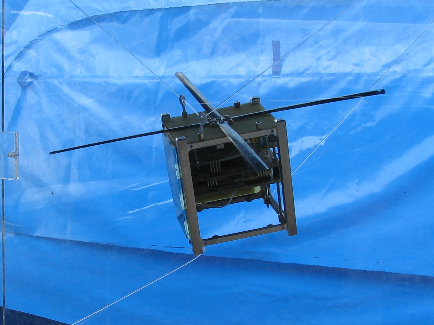 Zdjęcie modelu satelity PW-Sat na wystawie podczas XII Międzynarodowego Pikniku Lotniczego Góraszka 2007.